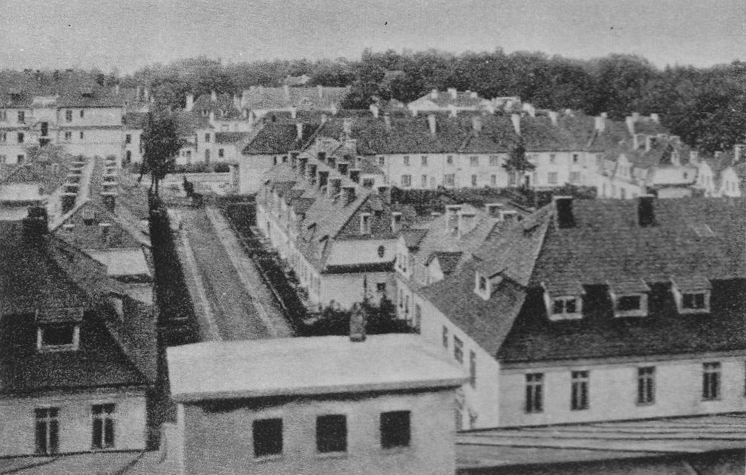 Kolonia Staszica w Warszawie